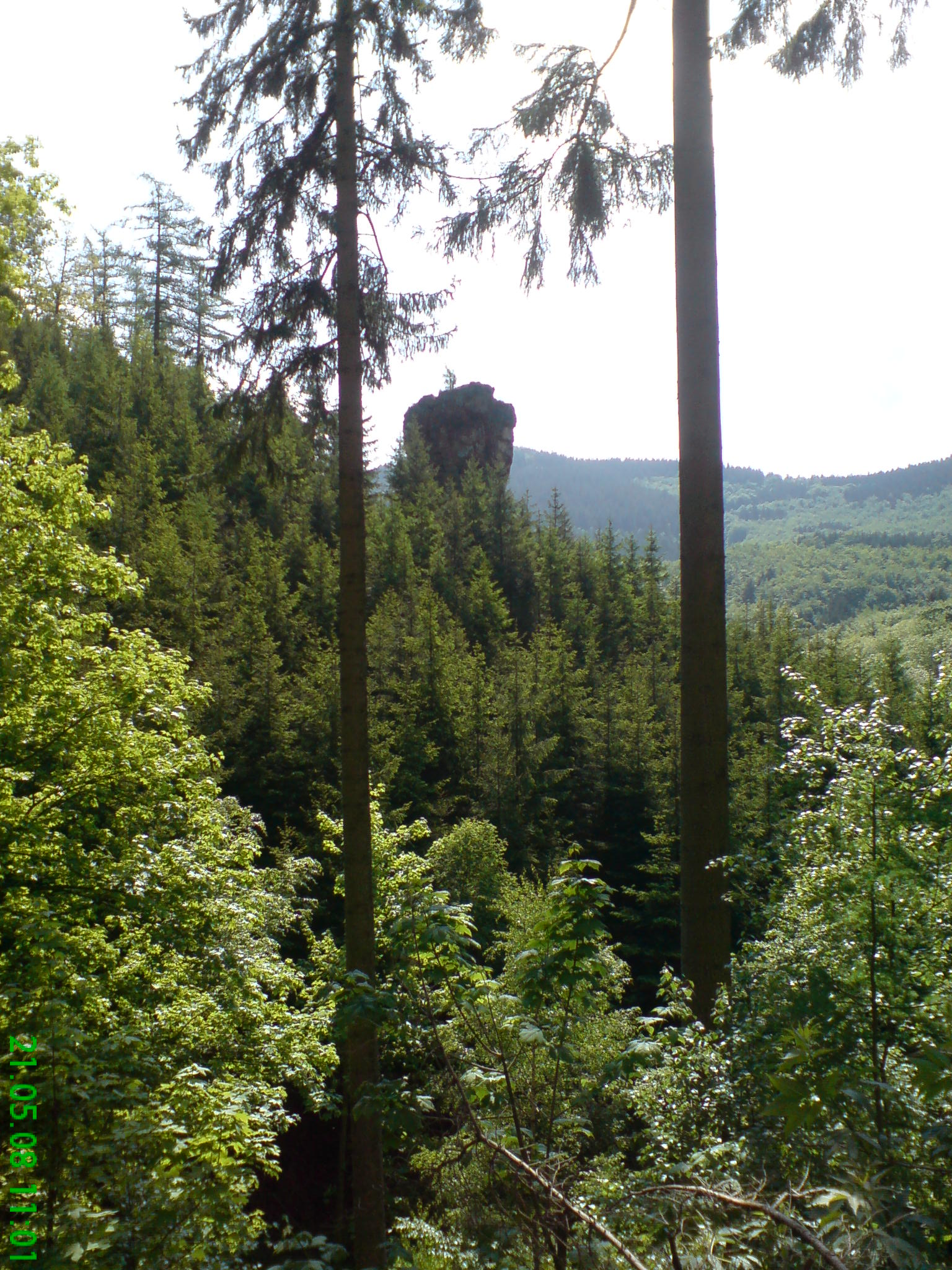 Ansicht des Kiliansteines aus Richtung Treppenstein.